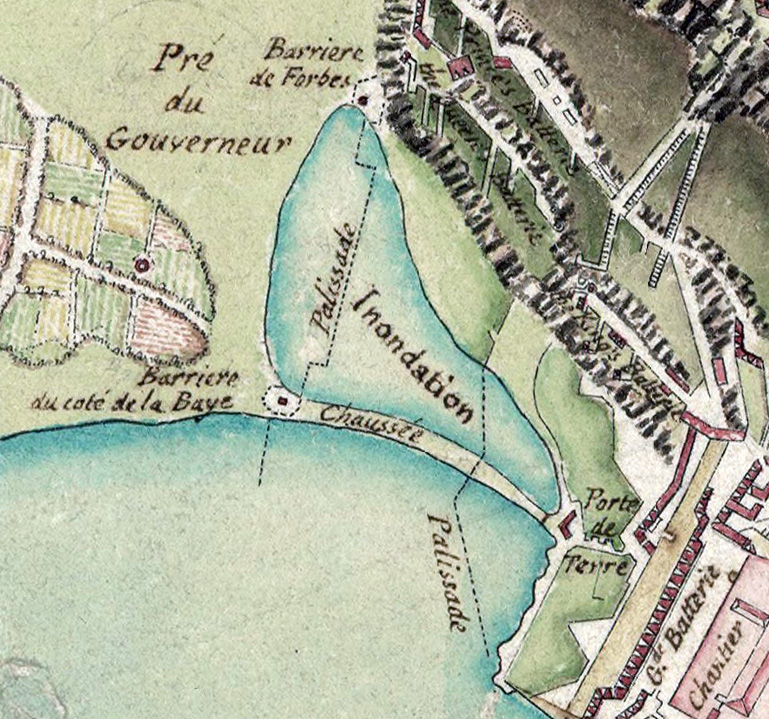 Extract from Plan de Gibraltar